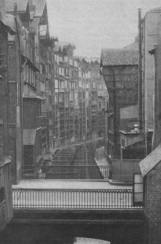 Der Gerbergraben in Metz um 1900, im Zuge der Stadterweiterung 1902 beseitigt.